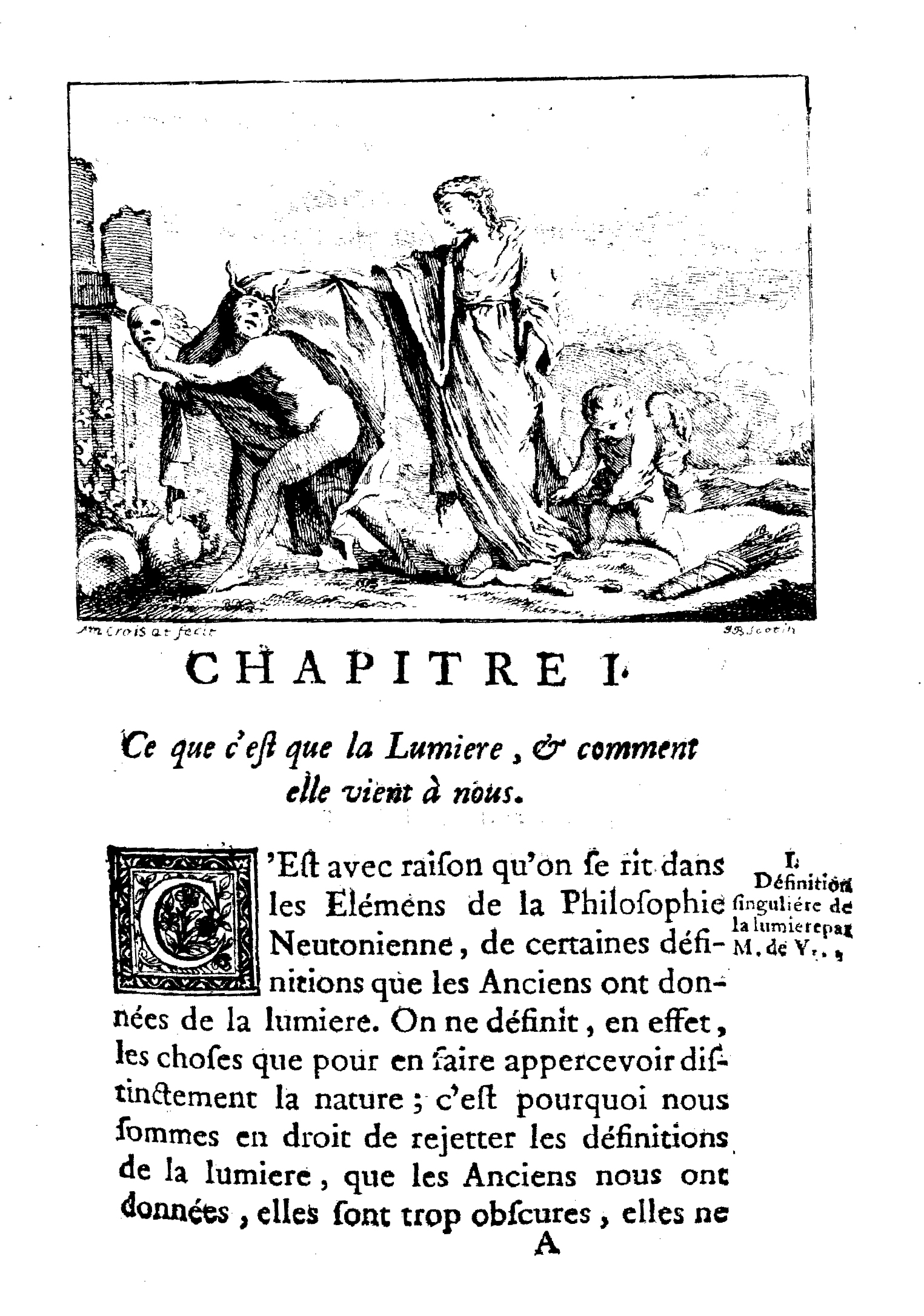 Examen et réfutation des Elemens de la philosophie de Neuton de m. de Voltaire. Avec une dissertation sur la réflexion & la réfraction de la lumiere [sic]. - A Paris : rue s. Jacques, chez Lambert, à la Sagesse : chez Durand, à Saint Landry, 1739. - [4], XCVIII, [10], 308, [4] p., 5 c. di tav. : ill. ; 8º. - Si tratta della risposta polemica a Élémens de la philosophie de Neuton mis à la portée de tout le monde, par M. de Voltaire, Amsterdam, Étienne Ledet et Compagnie, 1738. - Front. stampato in rosso e nero. - L'esemplare digitalizzato ha subito la censura del riferimento a Voltaire sul front. .